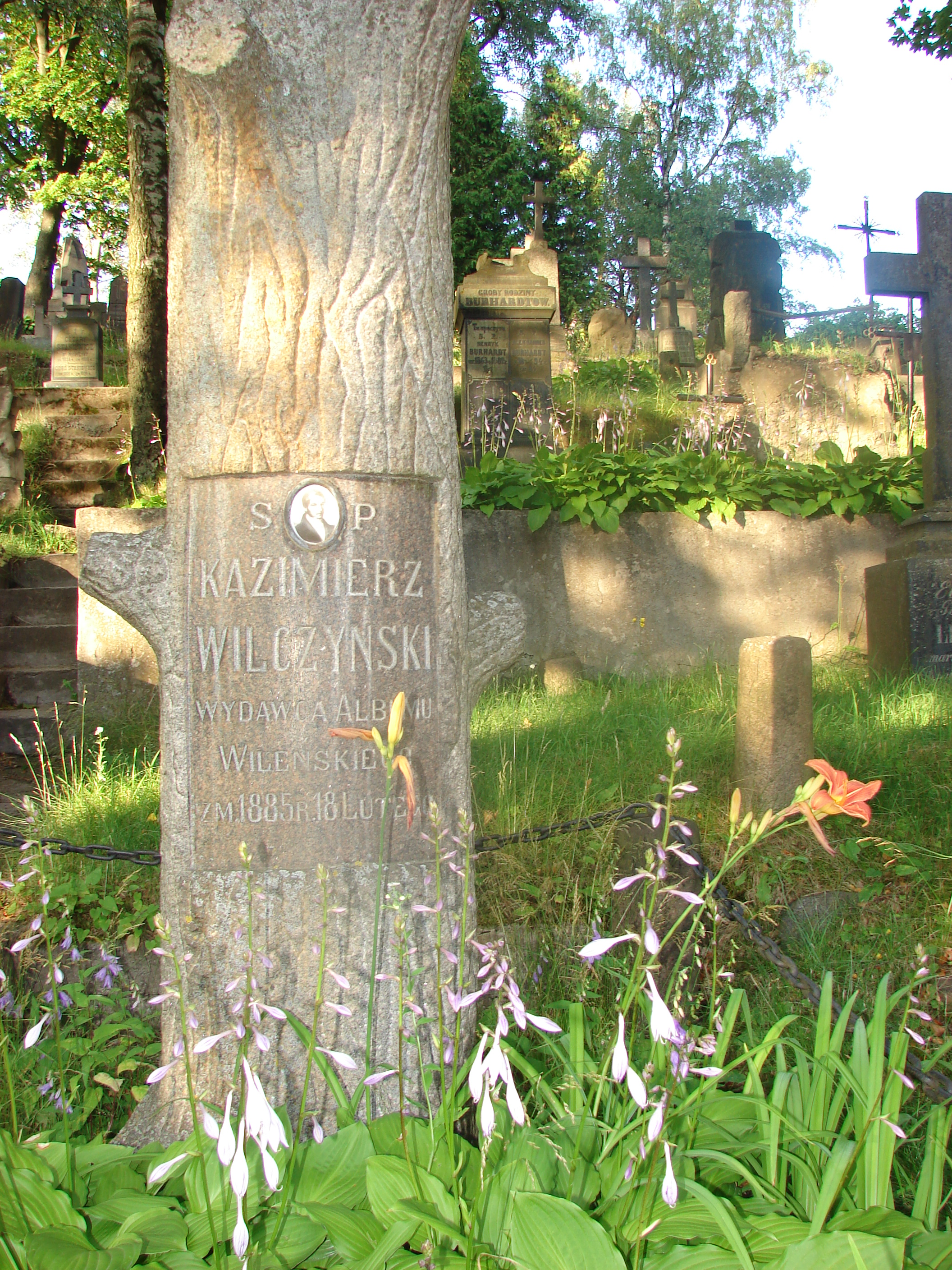 Grób Kazimierza Wilczyńskiego na cmentarzu Rossa w Wilnie